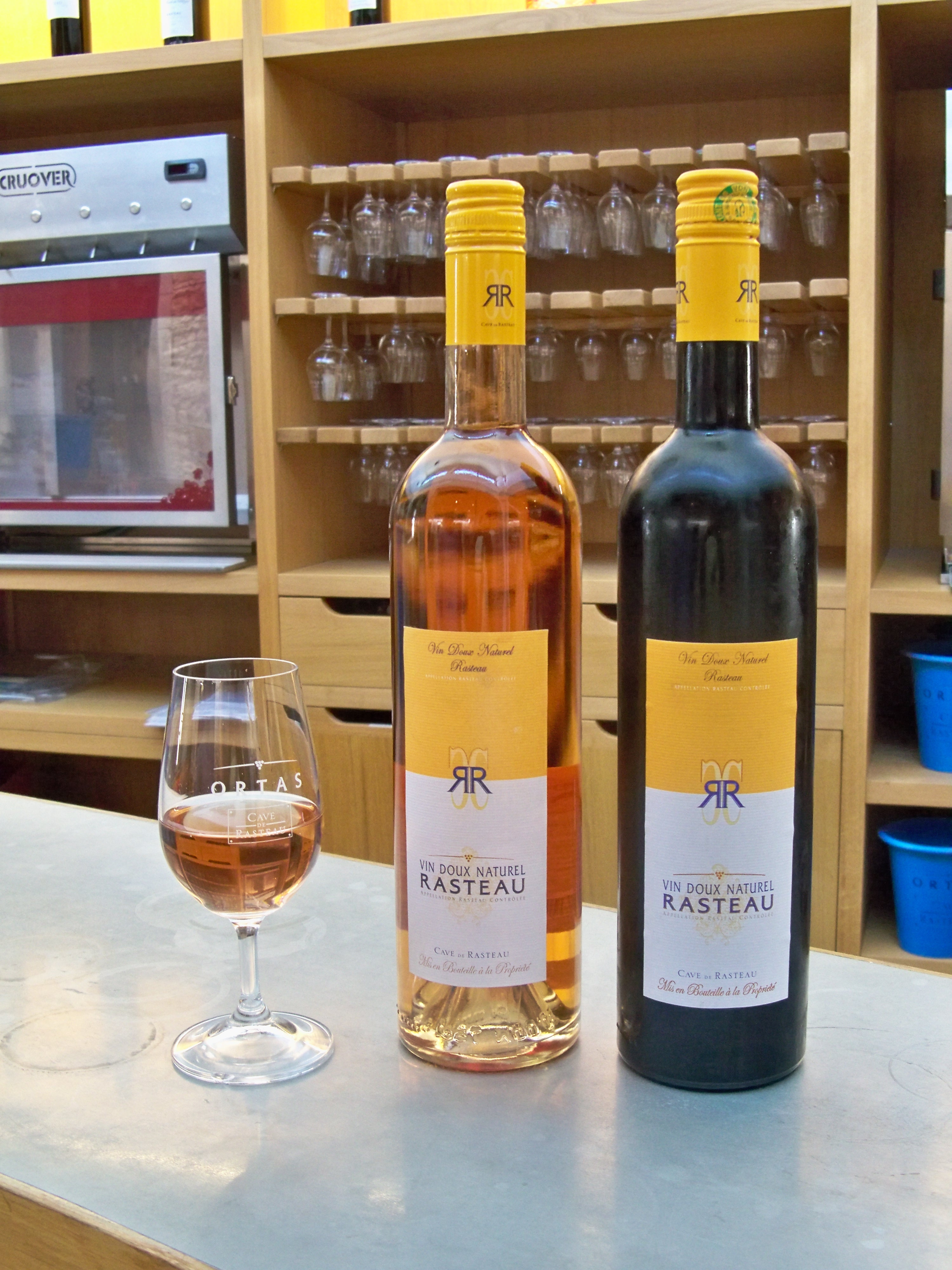 Bouteilles d'AOC Rasteau, Vaucluse, France